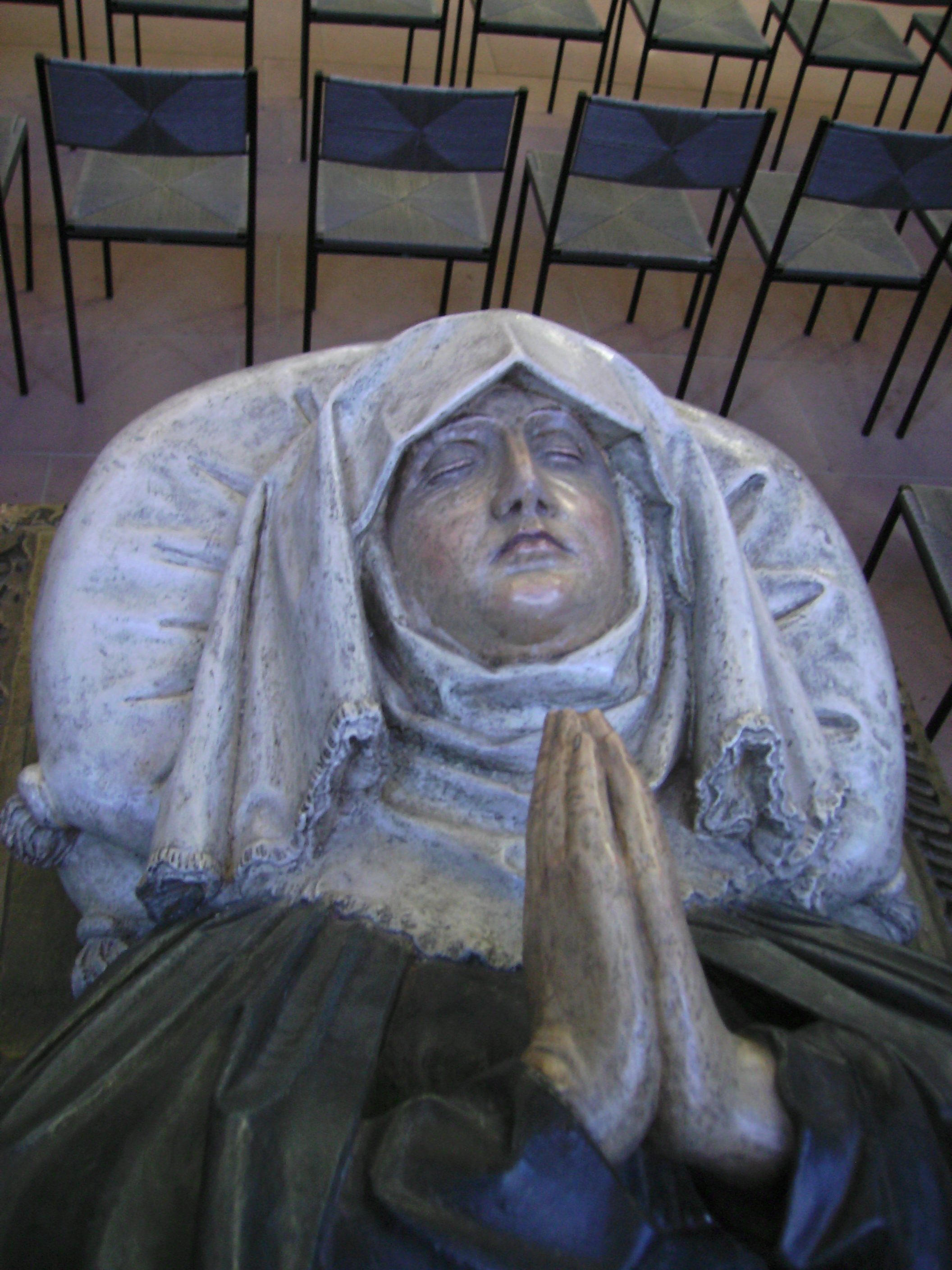 Elisabeth von Lothringen: Portrait auf Thumba in der Stiftskirche St. Arnual